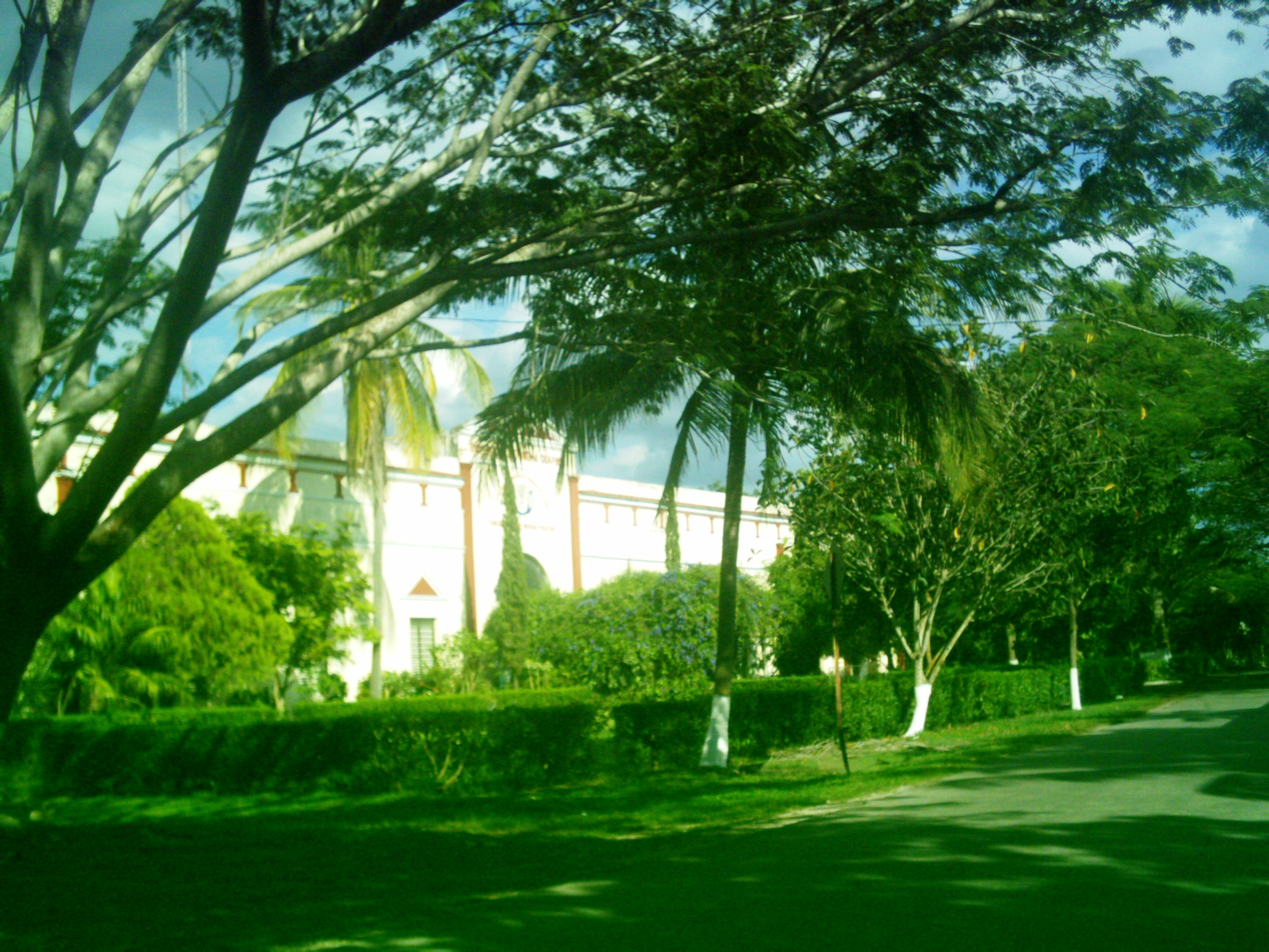 Hacienda de de Temozón Norte, Yucatán.